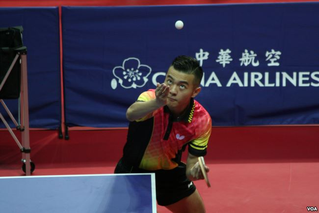 中文（中国大陆）: 中国乒乓球国手朱霖峰2017年8月23日参与台北世大运比赛 （美国之音黎堡摄）